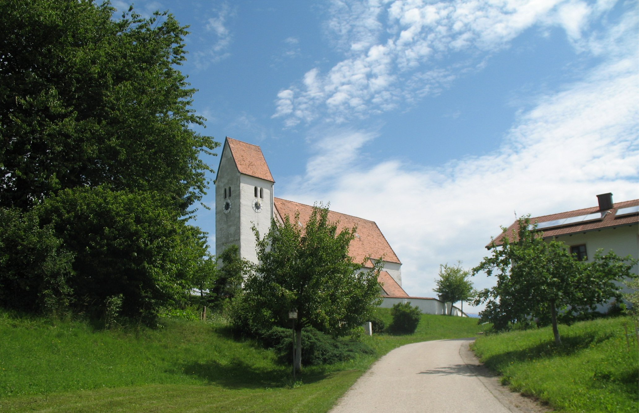 Kirche St. Georg